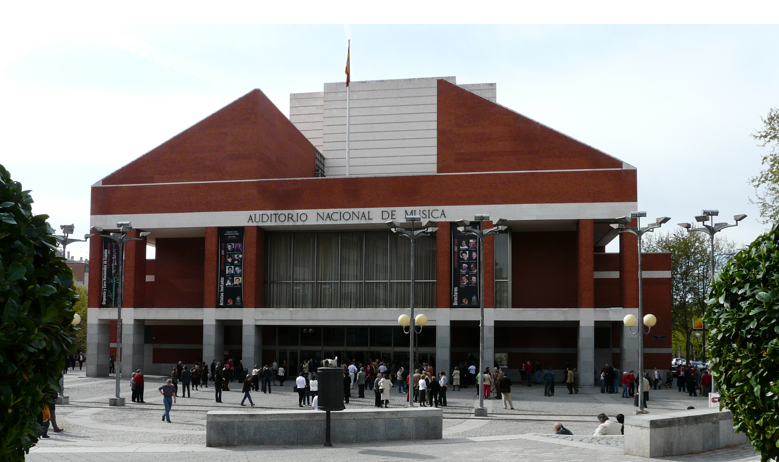 Auditorio Nacional de Música en Madrid, España, donde tienen la sede la Orquesta Nacional de España, el Coro Nacional de España y la Joven Orquesta Nacional de España.